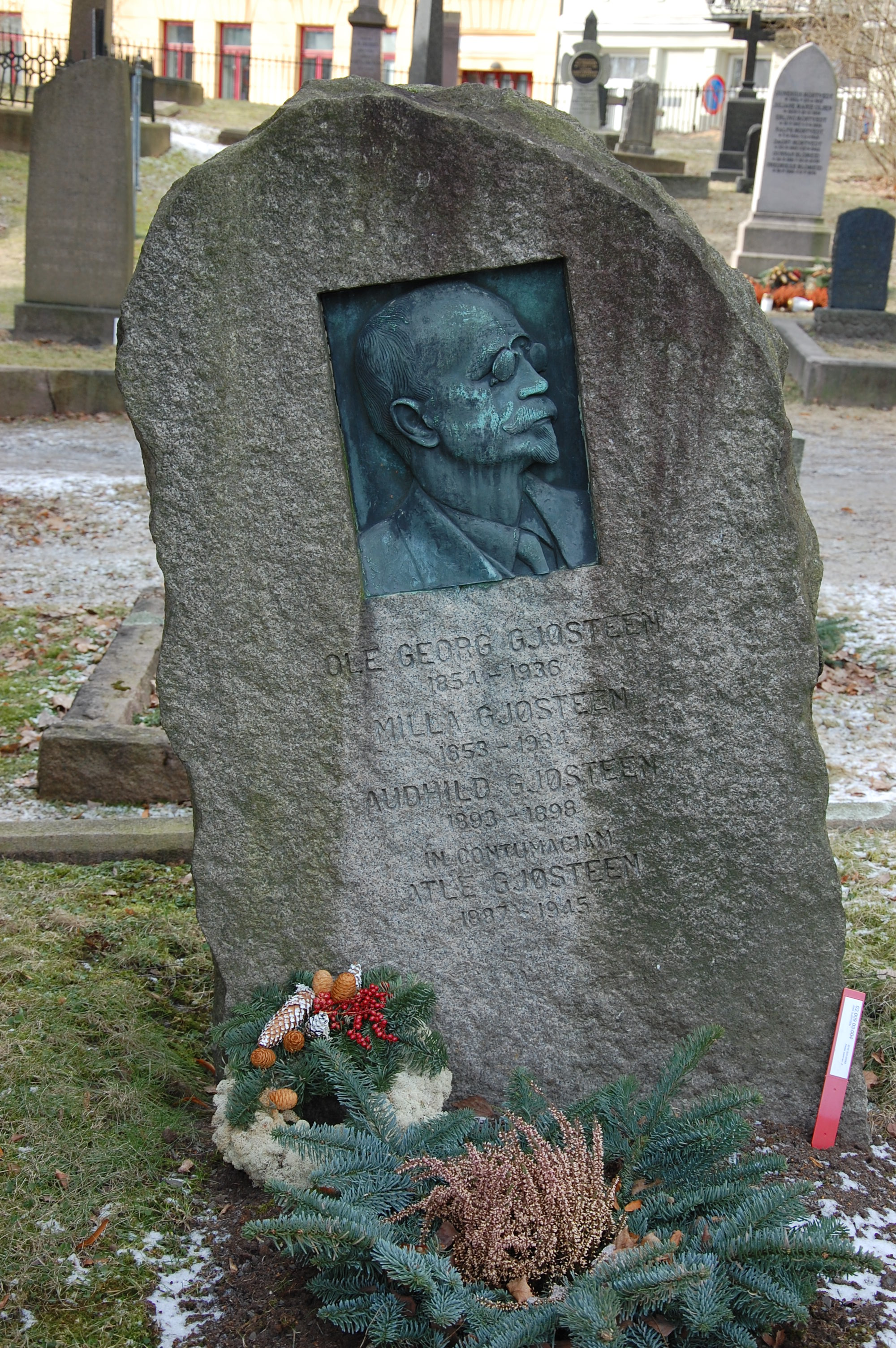 Ole Georg Gjøsteen (1854-1936), instrumentmaker og politiker. Først med i Venstre, deretter i Arbeiderpartiet.